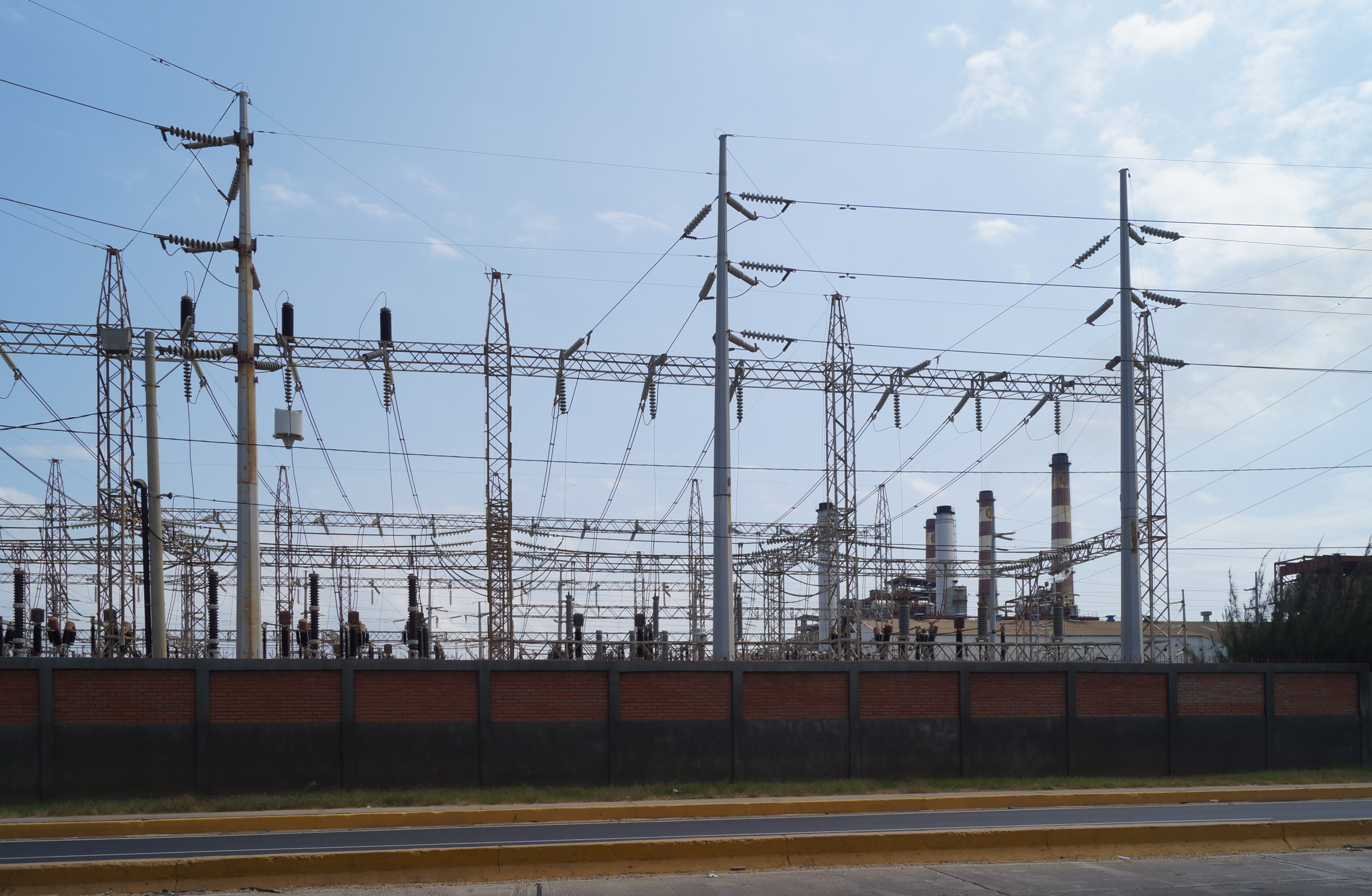 Líneas de transmisión de energía eléctrica, Maracaibo, Venezuela.